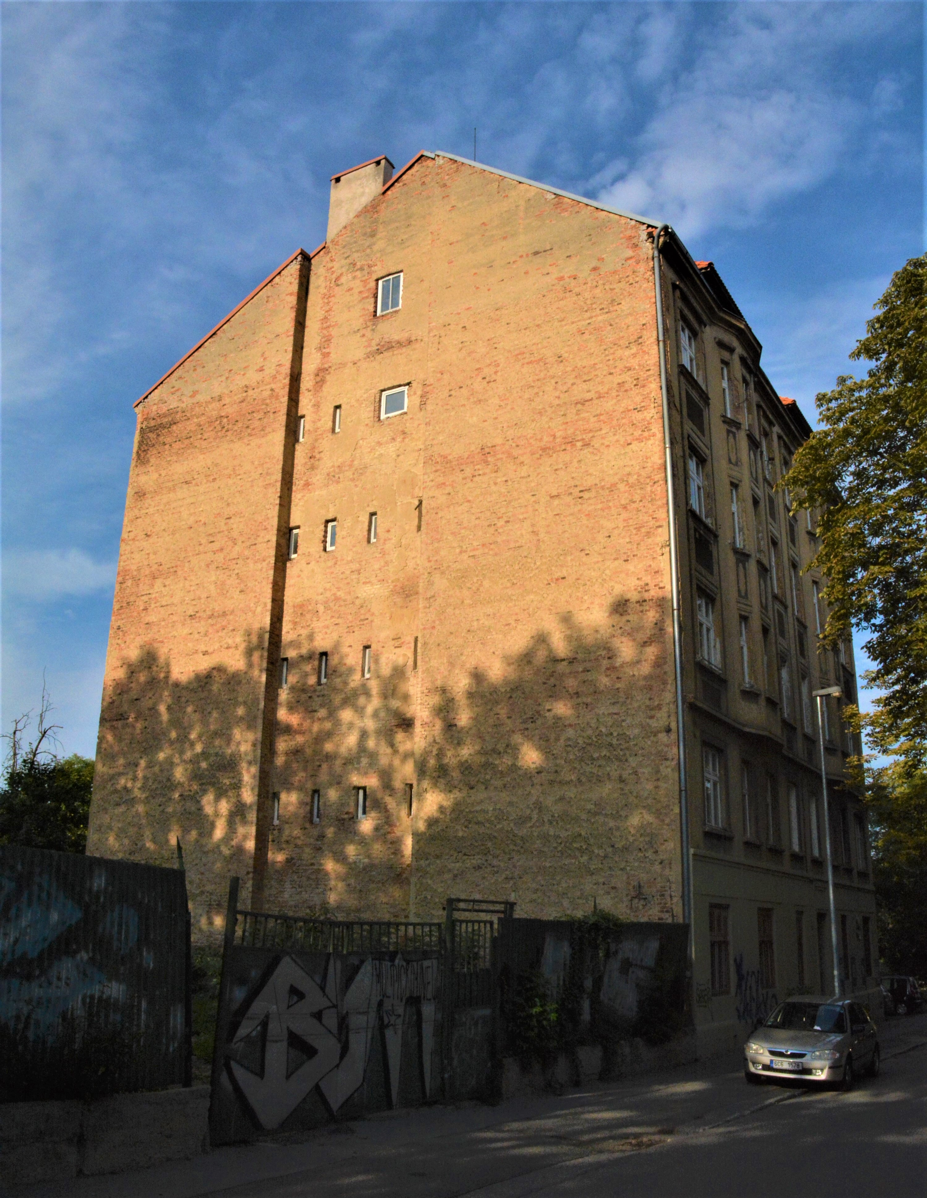 Břevnovský mrakodrap, Radimova č. 447/8, Břevnov, 169 00 Praha 6.